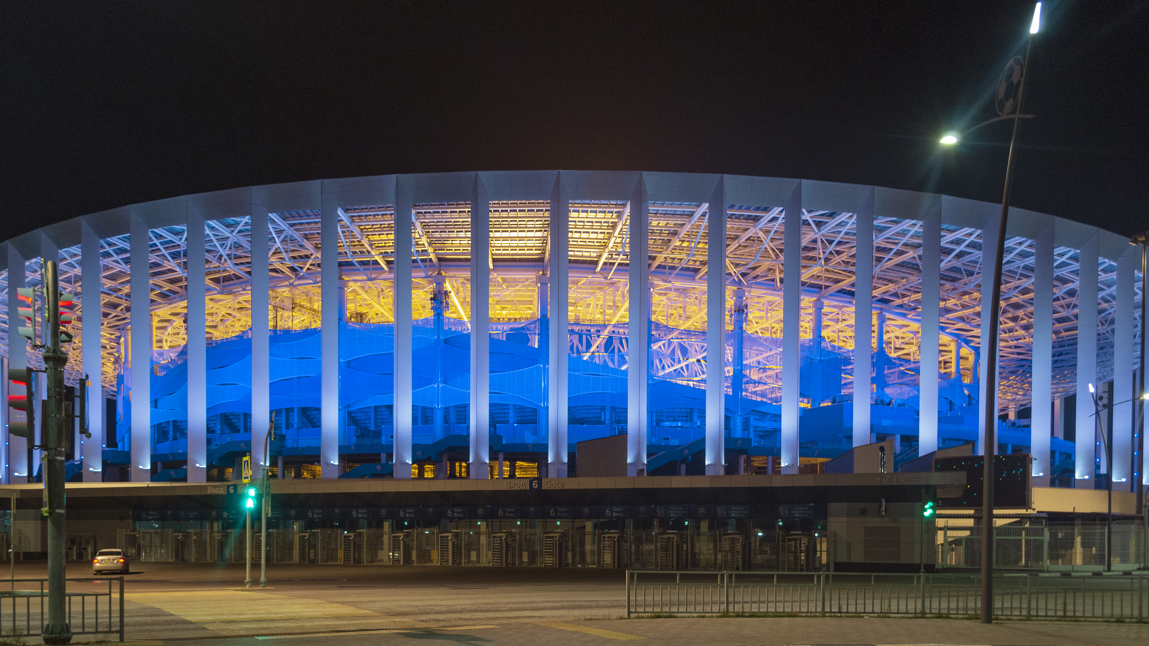 Стадион «Нижний Новгород» ночью